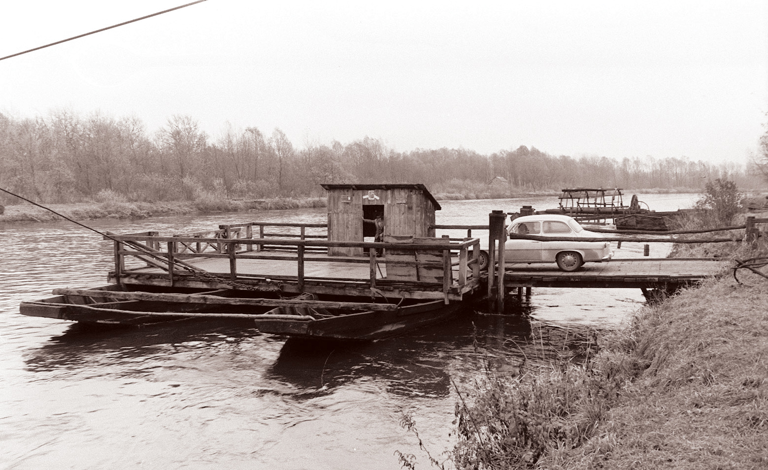 Brod na Muri pri Bistrici